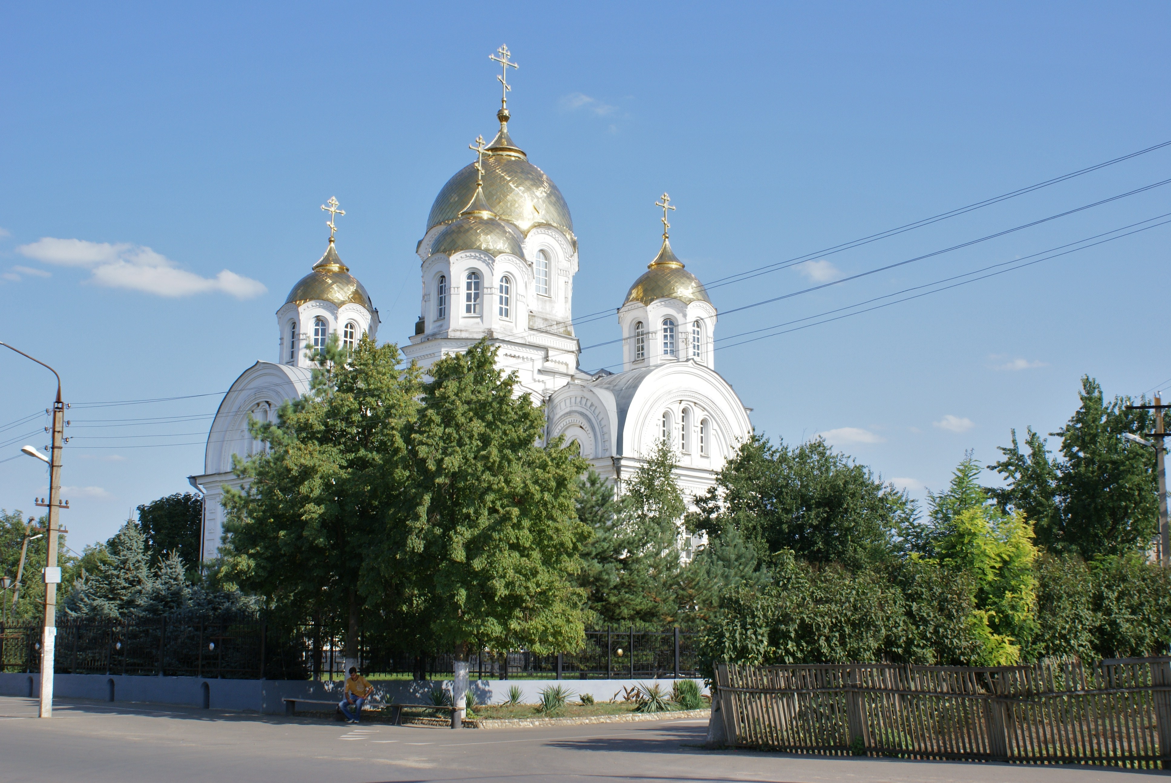 Вознесенская церковь (Краснодарский край, Динской район, станица Пластуновская, центр)